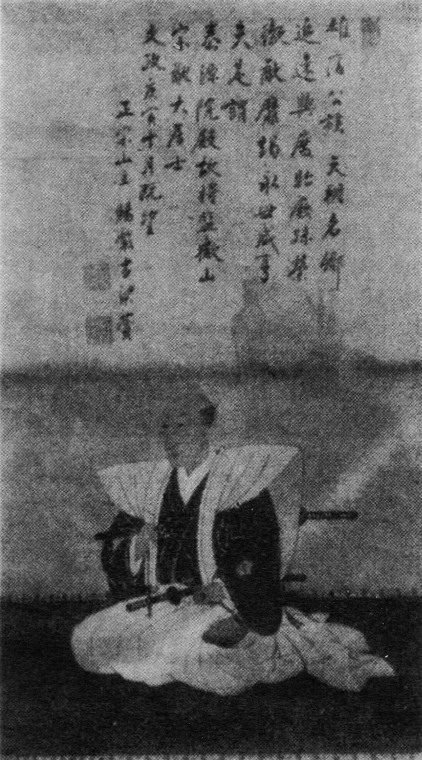 水沢伊達氏10代伊達村福の肖像画。